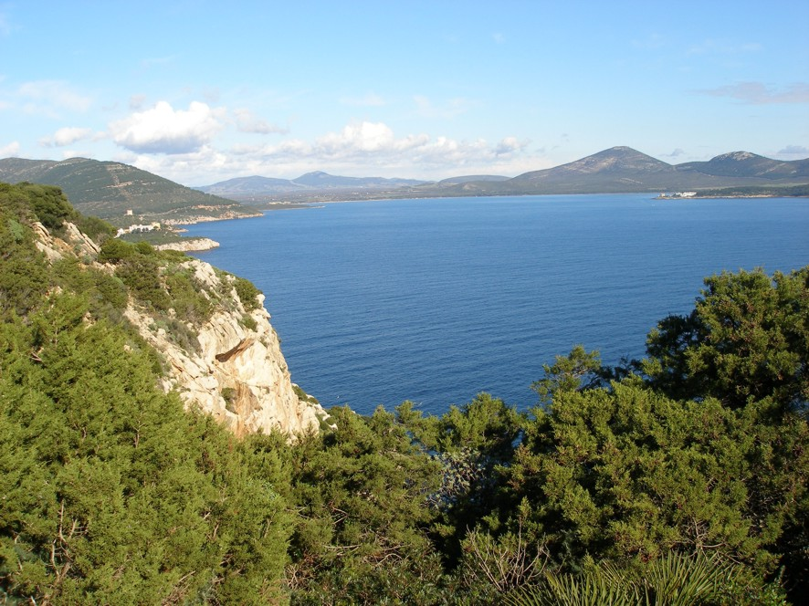 Porto Conte - Vista da Capo Caccia Port del Comte -Vista des del Cap de la Caça